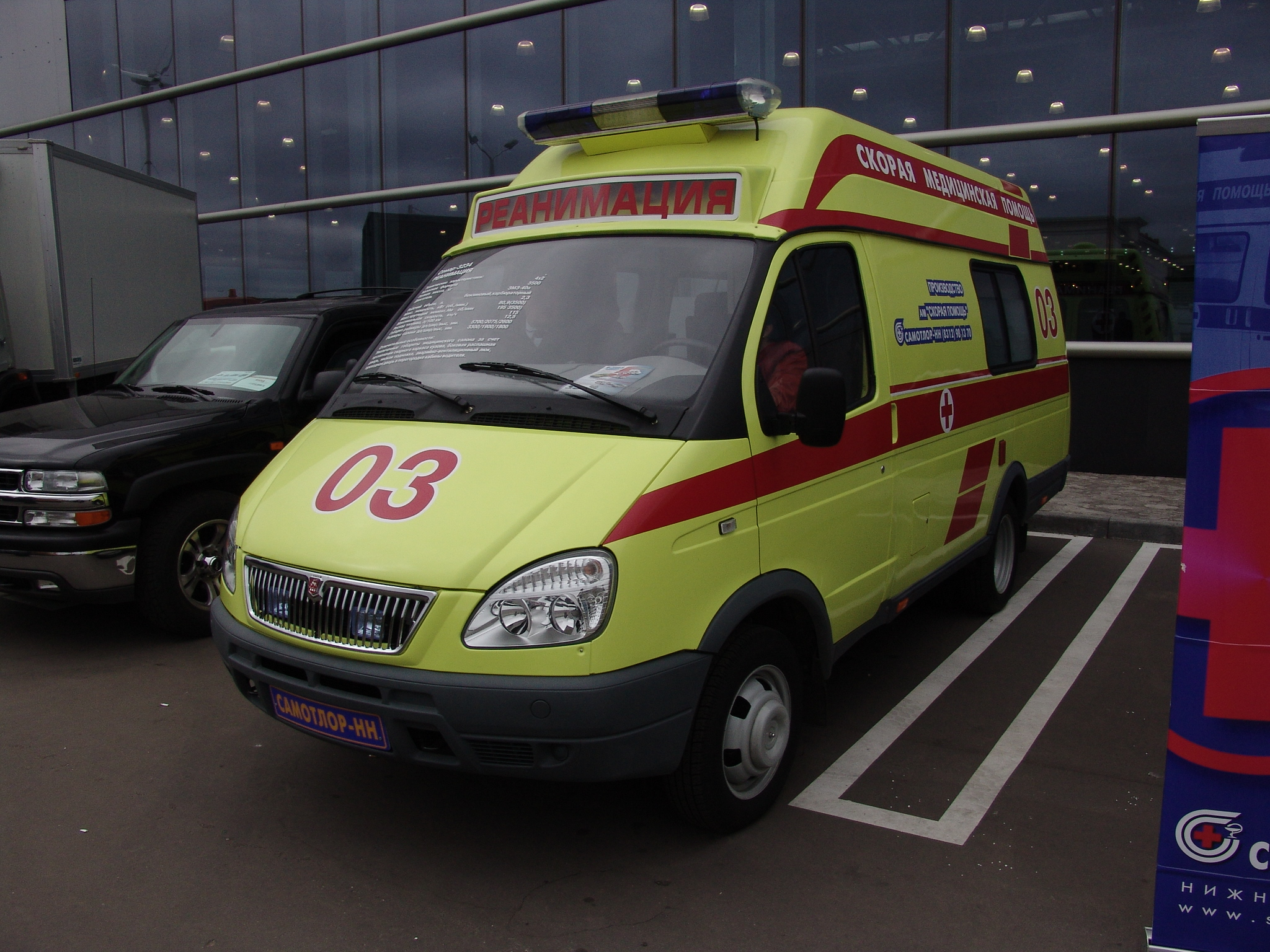 Газель-реанимобиль СемАР-3234, на ММАС-2003